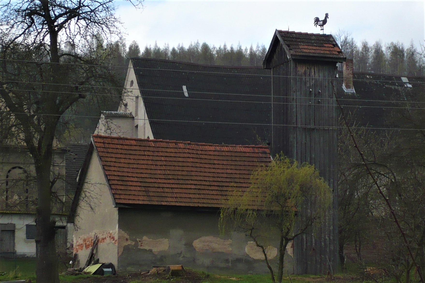 Remiza w Suszynie